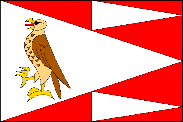 vlajka, Jestřebí, okres Šumperk